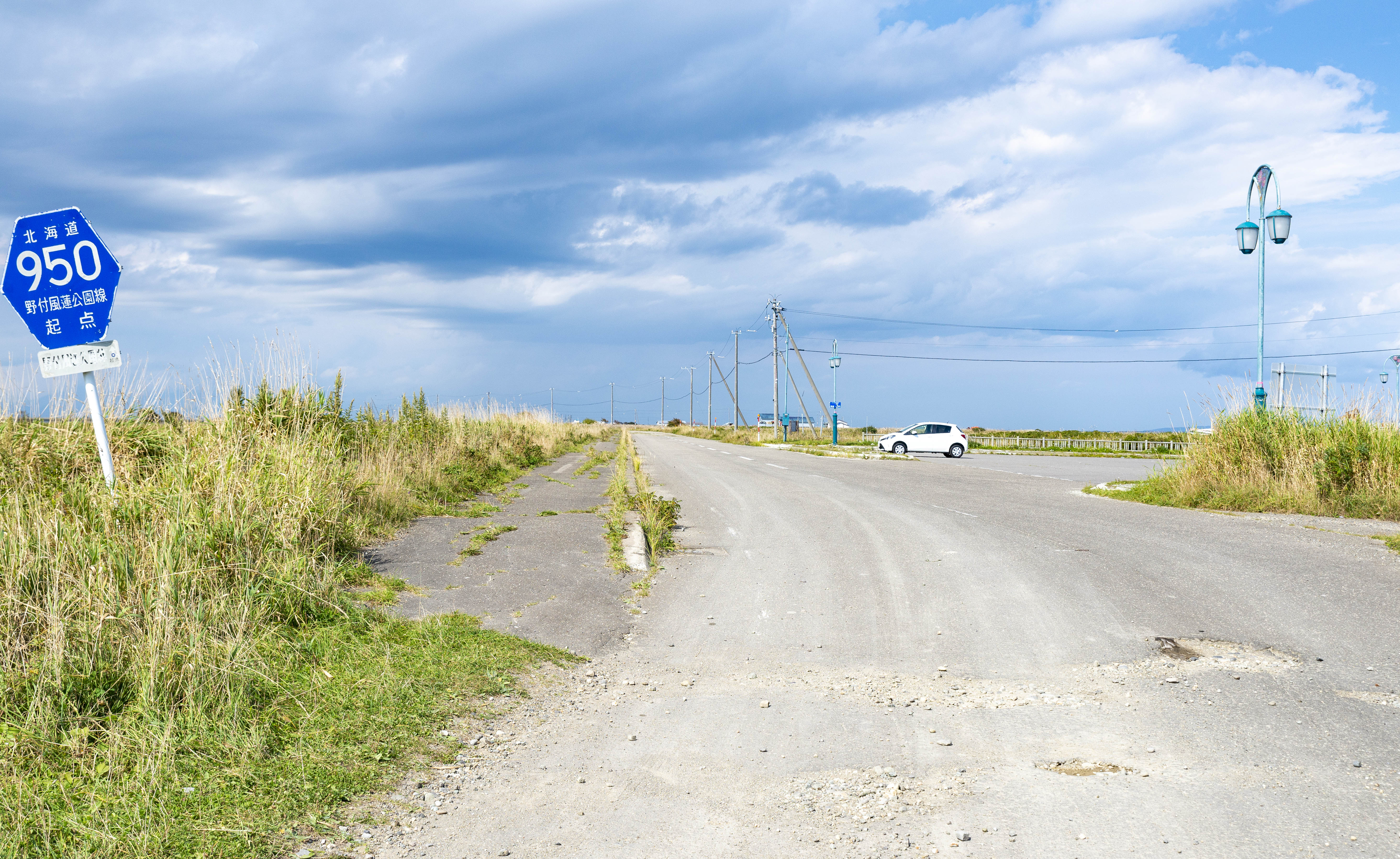 北海道道950号線野付風蓮公園線